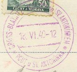 příležitostné razítko pof. PR24 (text "GROSS BLATNITZ – BLATNICE POD SV. ANTONÍNKEM/ POUŤ u SV. ANTONÍNKA") s datem 18. VI. [19]40 – výřez z pohlednice opatřené známkou Protektorátu Čechy a Morava v hodnotě 50 haléřů